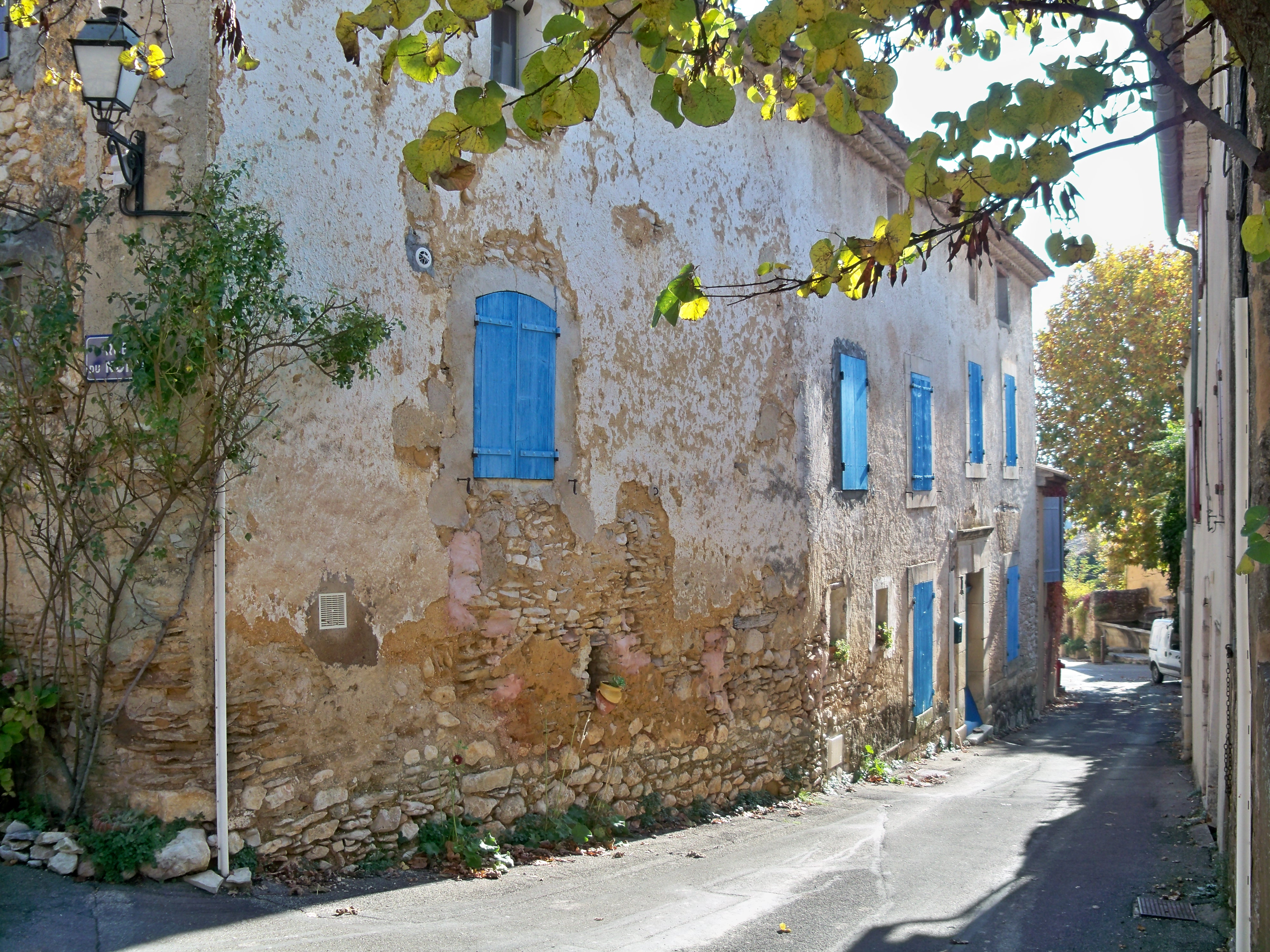 Maison à Grand Clément (Vaucluse, France)